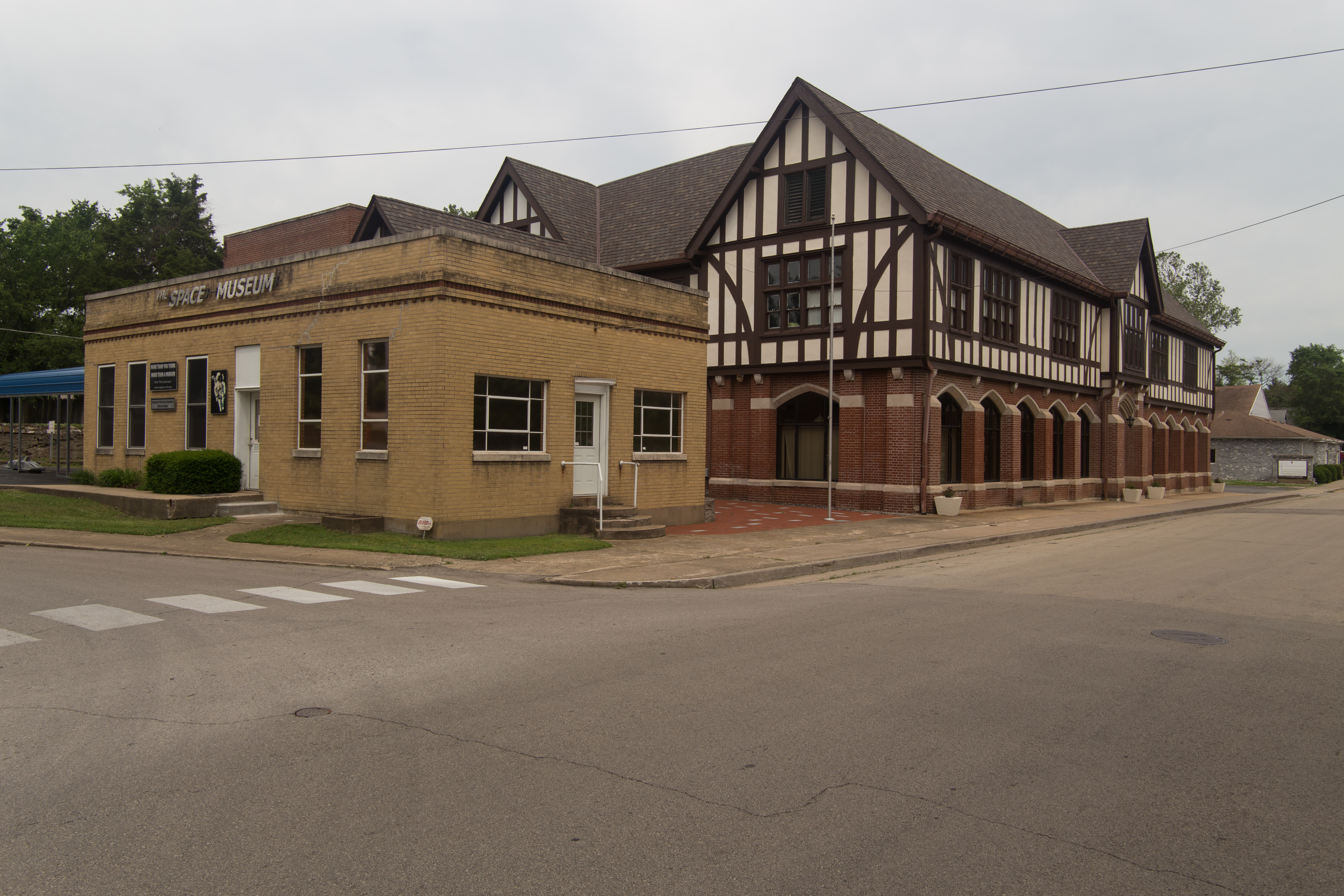 Bonne Terre, Missouri